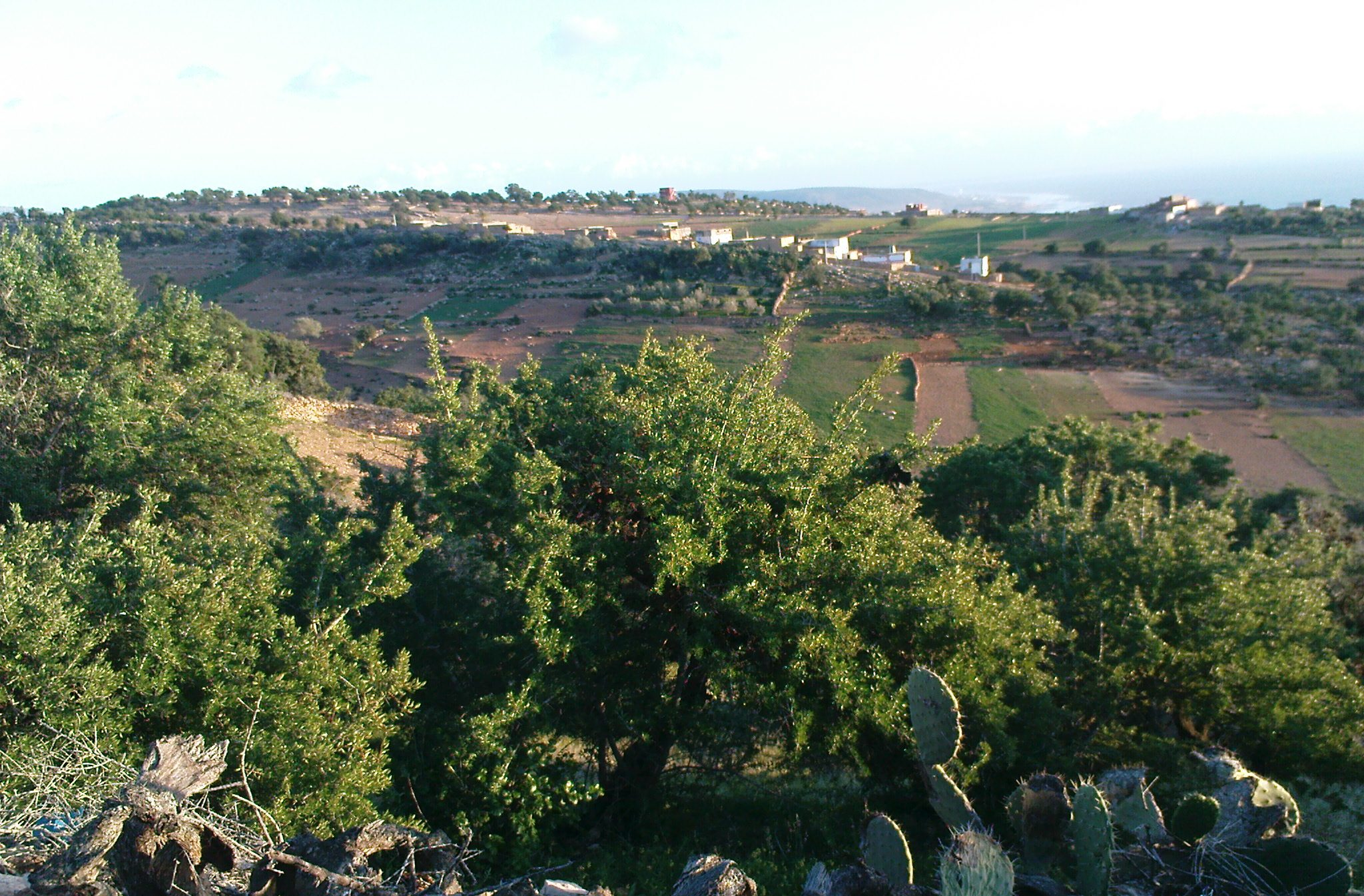 Tašlḥiyt/ⵜⴰⵛⵍⵃⵉⵜ: Tasgaoudrar n Taghazout : Tafssut 2009